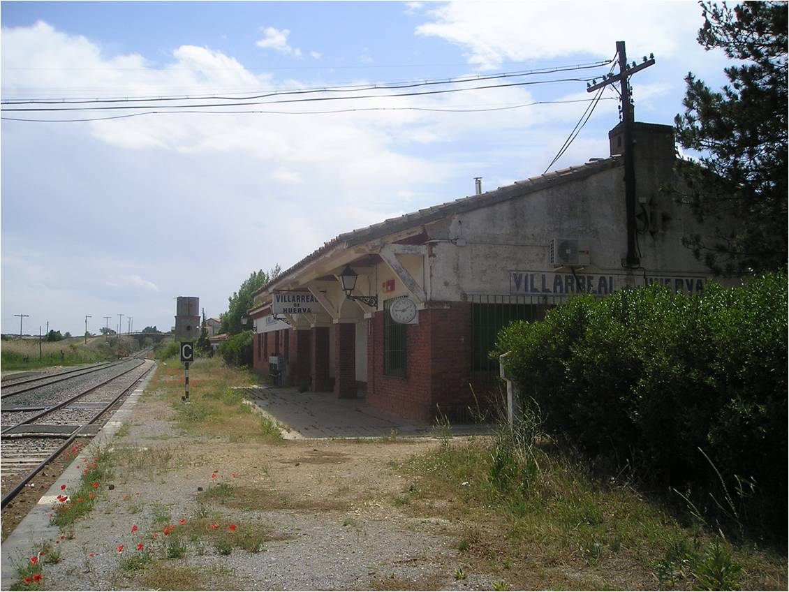 Estación de Villarreal de Huerva (Zaragoza).